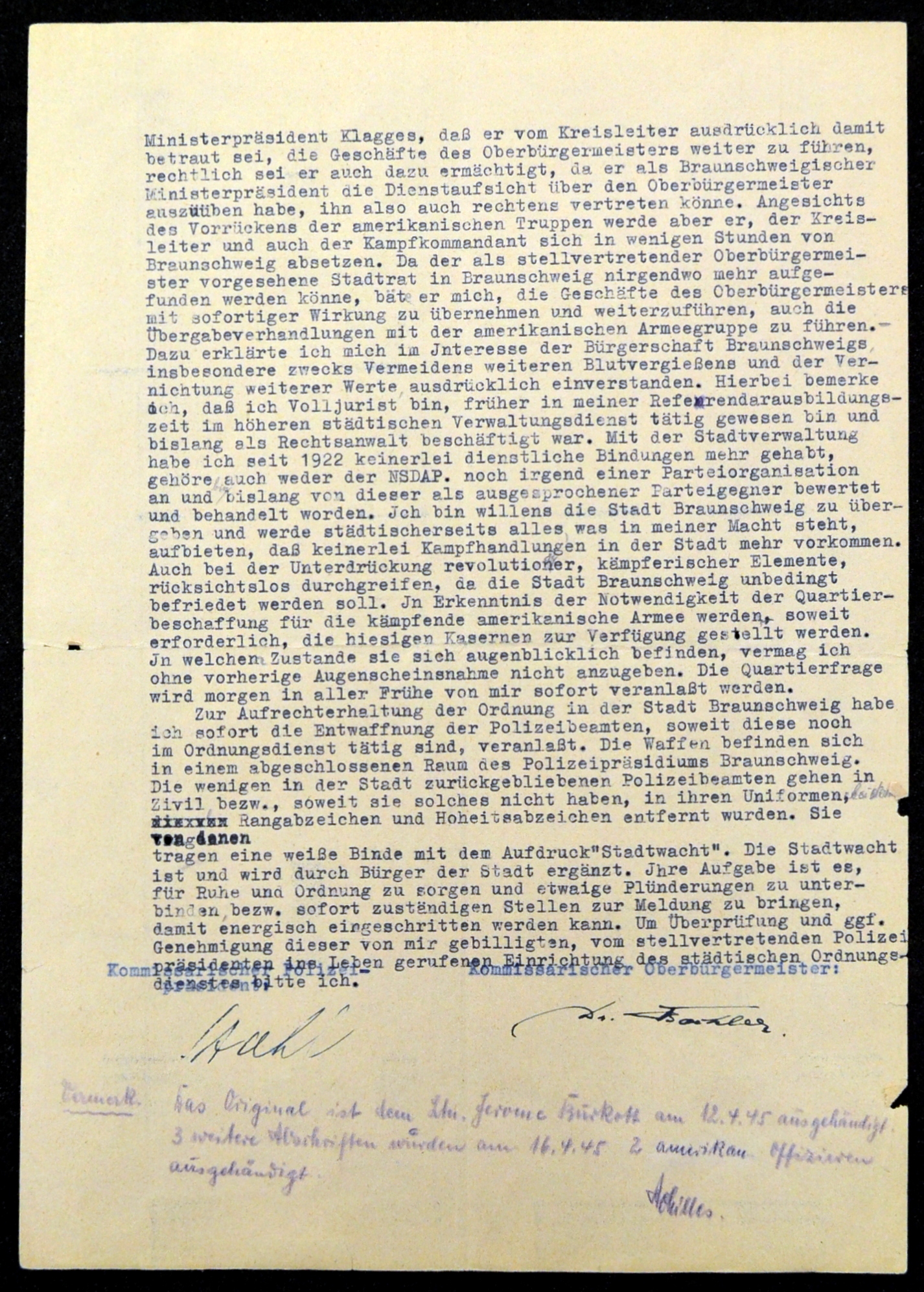 Übergabe der Stadt Braunschweig: Übergabeprotokoll (Seite 2) vom 12. April 1945. Mit Unterschrift von Oberbürgermeister Erich Bockler, Polizeihauptmann Karl-Heinz Stahl und Nachtrag von Protokollführer Alfred Achilles.